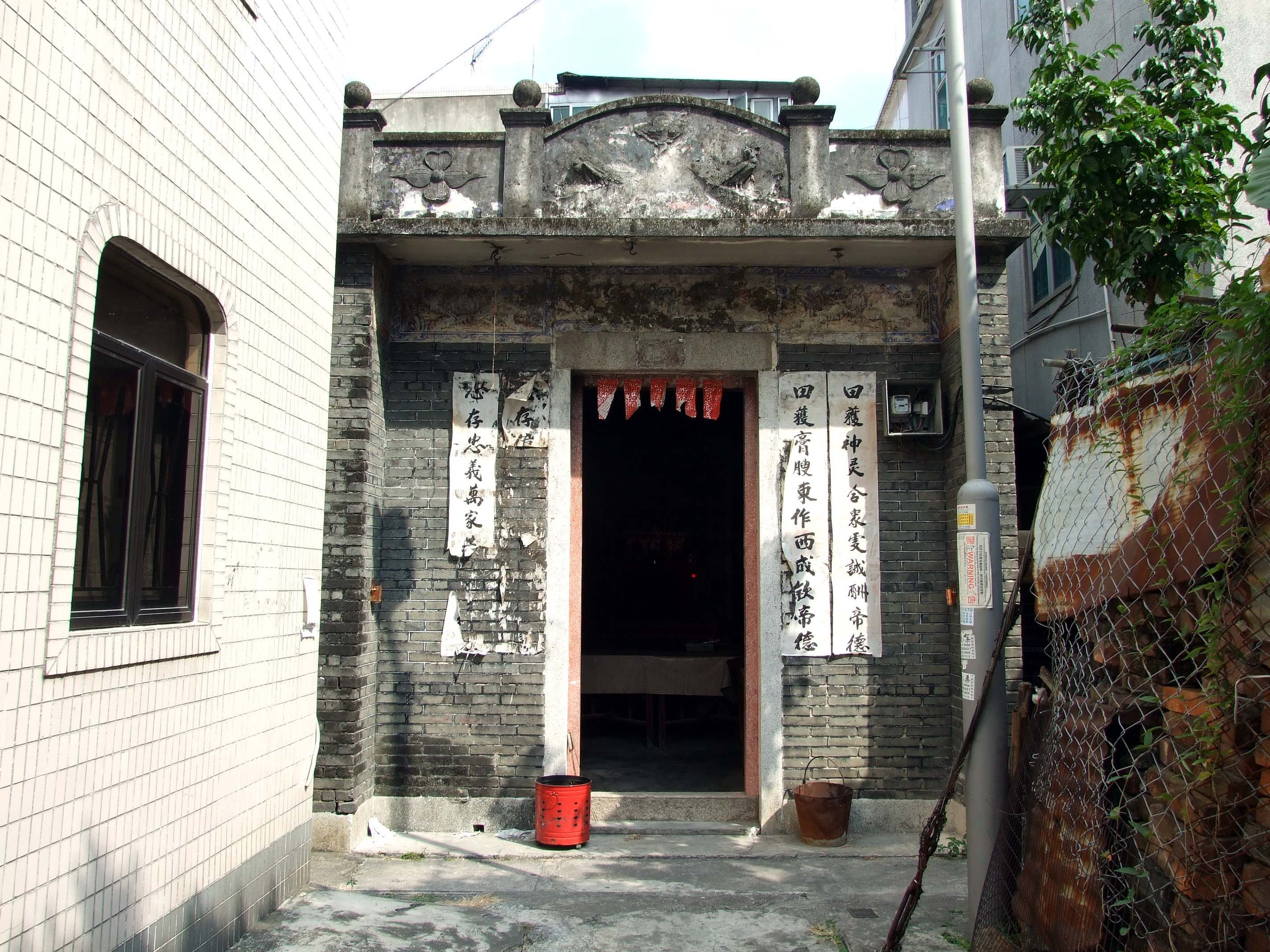 中文（香港）: 洪水橋田心村神廳